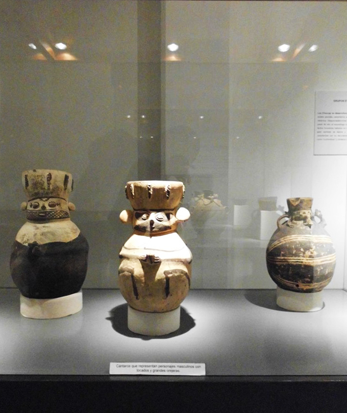 Cantaros que representan a personajes masculinos